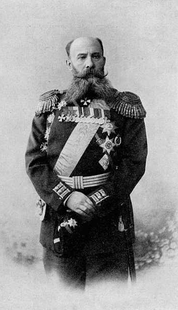 Оскар Казимирович Гриппенберг, русский генера.